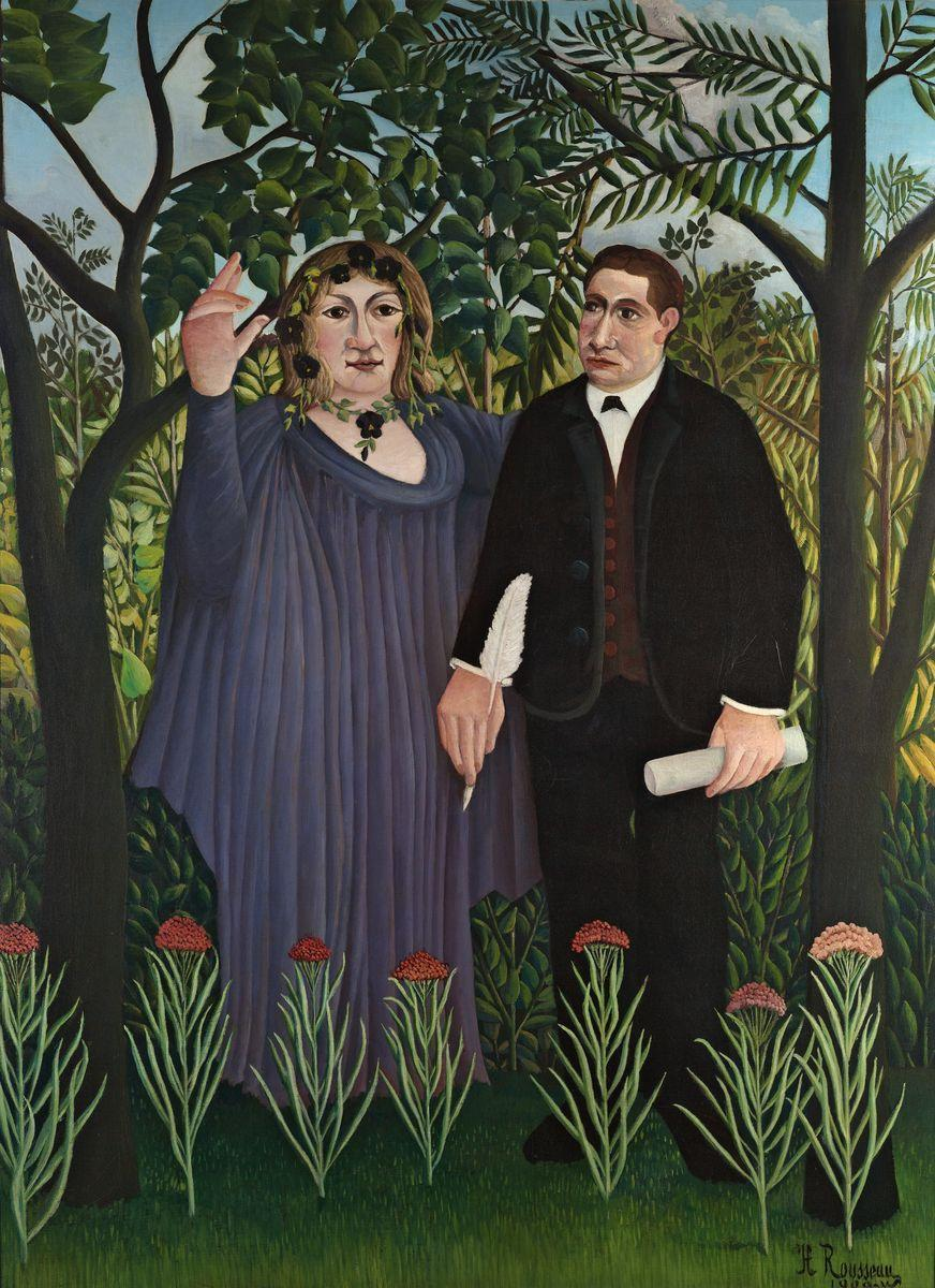 La Muse inspirant le poète, Henri Rousseau, musée des beaux-arts Pouchkine